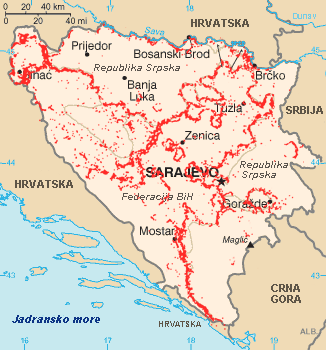 Mine u BiH, sept. 2008